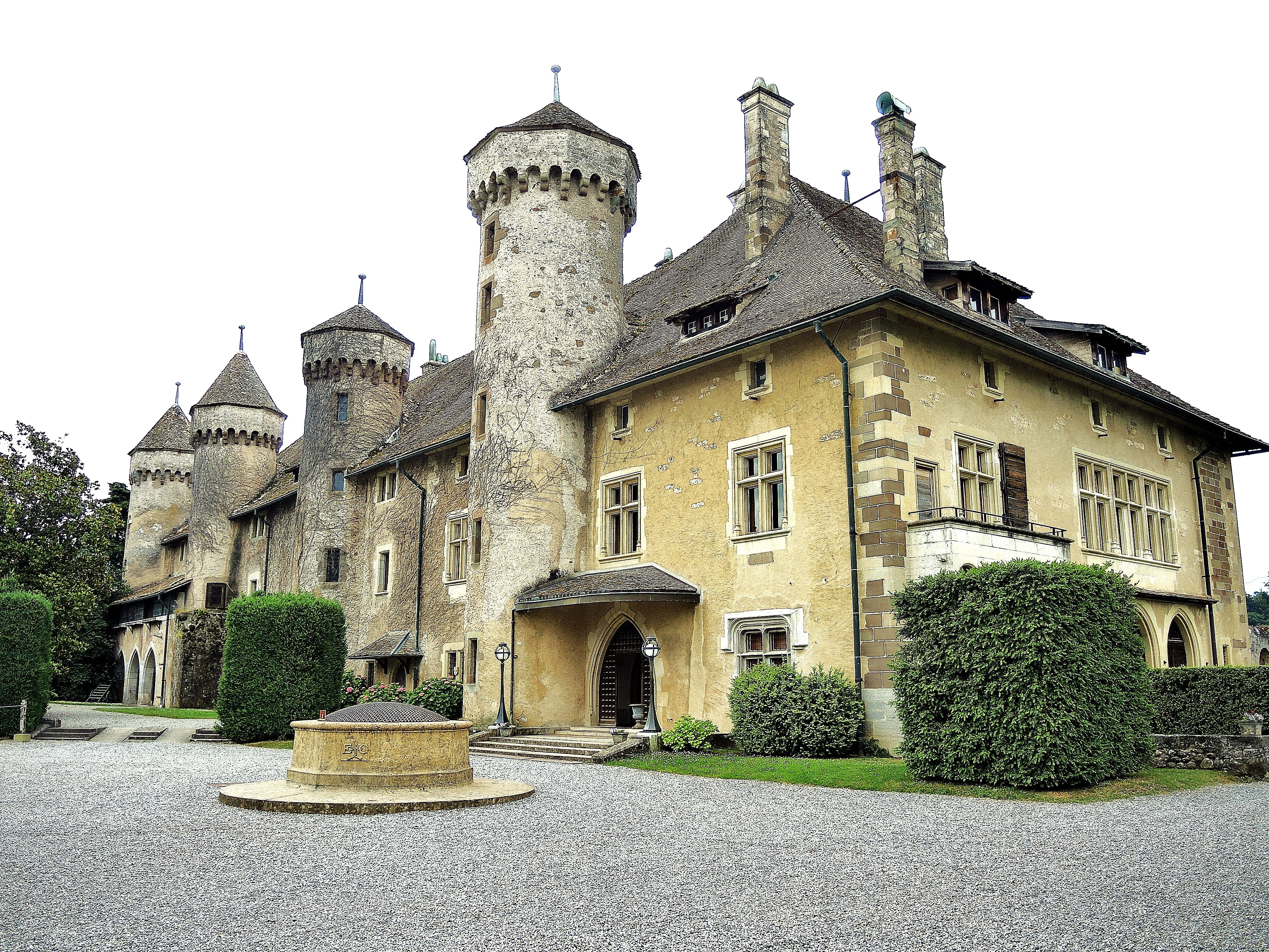 Château de Ripaille.